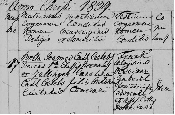 Ján Bolla a Karolína Anna Zellinger - sobášný záznam v matrike mesta Svätý Jur z roku 1839